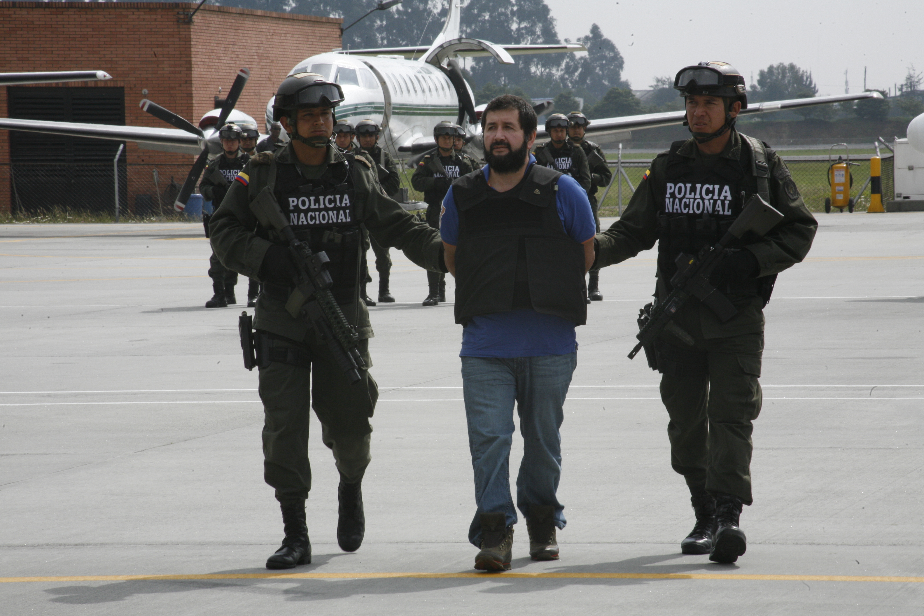 Junto al último capo de la mafia en Colombia, fueron enviados otros cinco delincuentes, incluidos alias "Jota", el número uno del clan Cifuentes Villa